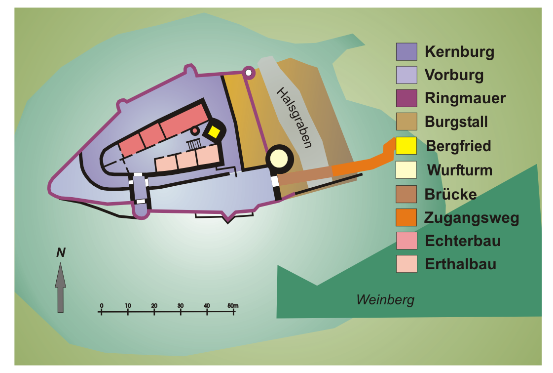 Plan der Trimburg in Elfershausen-Trimberg (Bavaria, Germany)